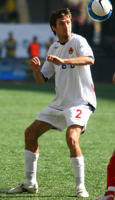 Deividas Šemberas